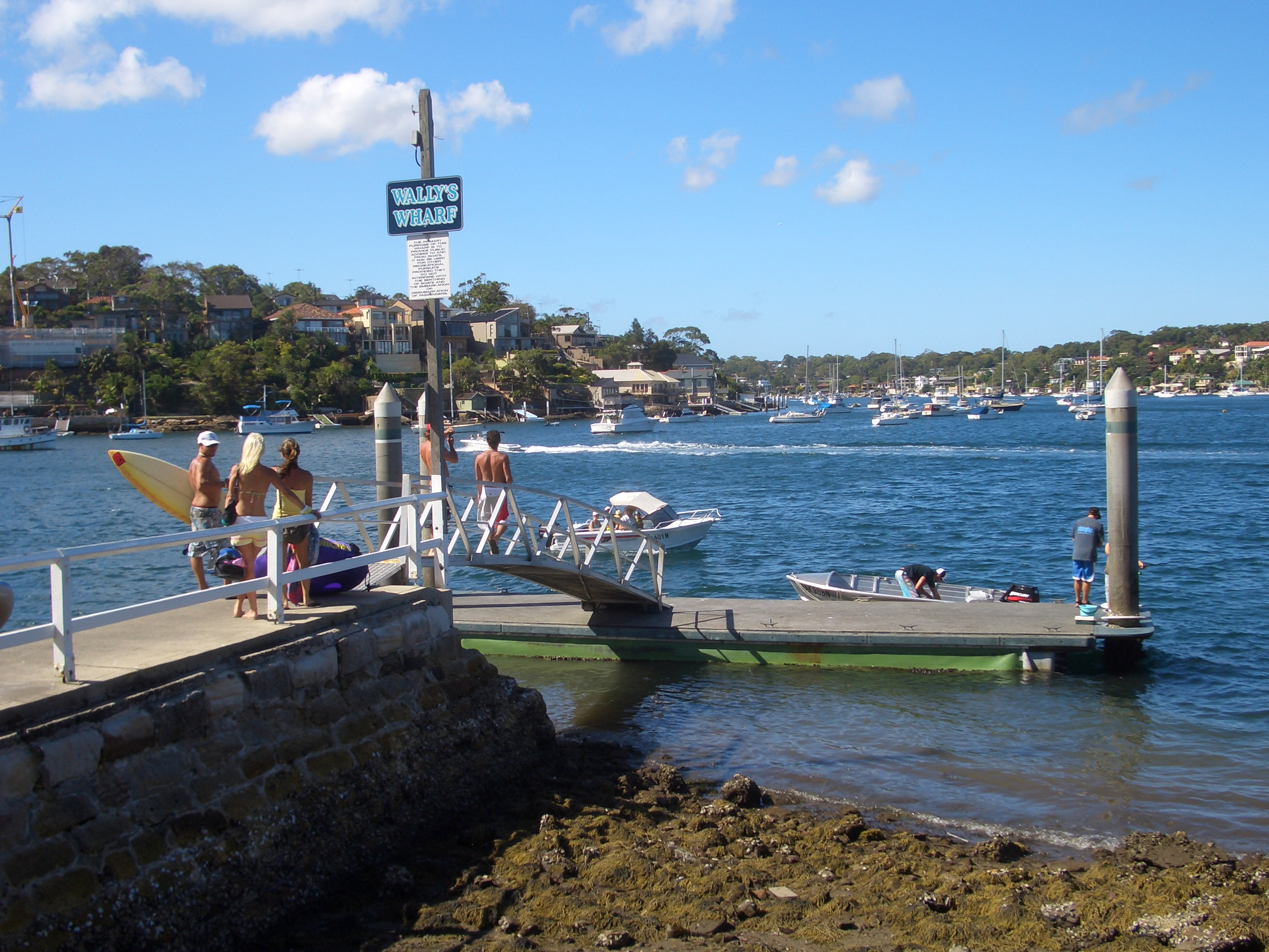 Dolans Bay